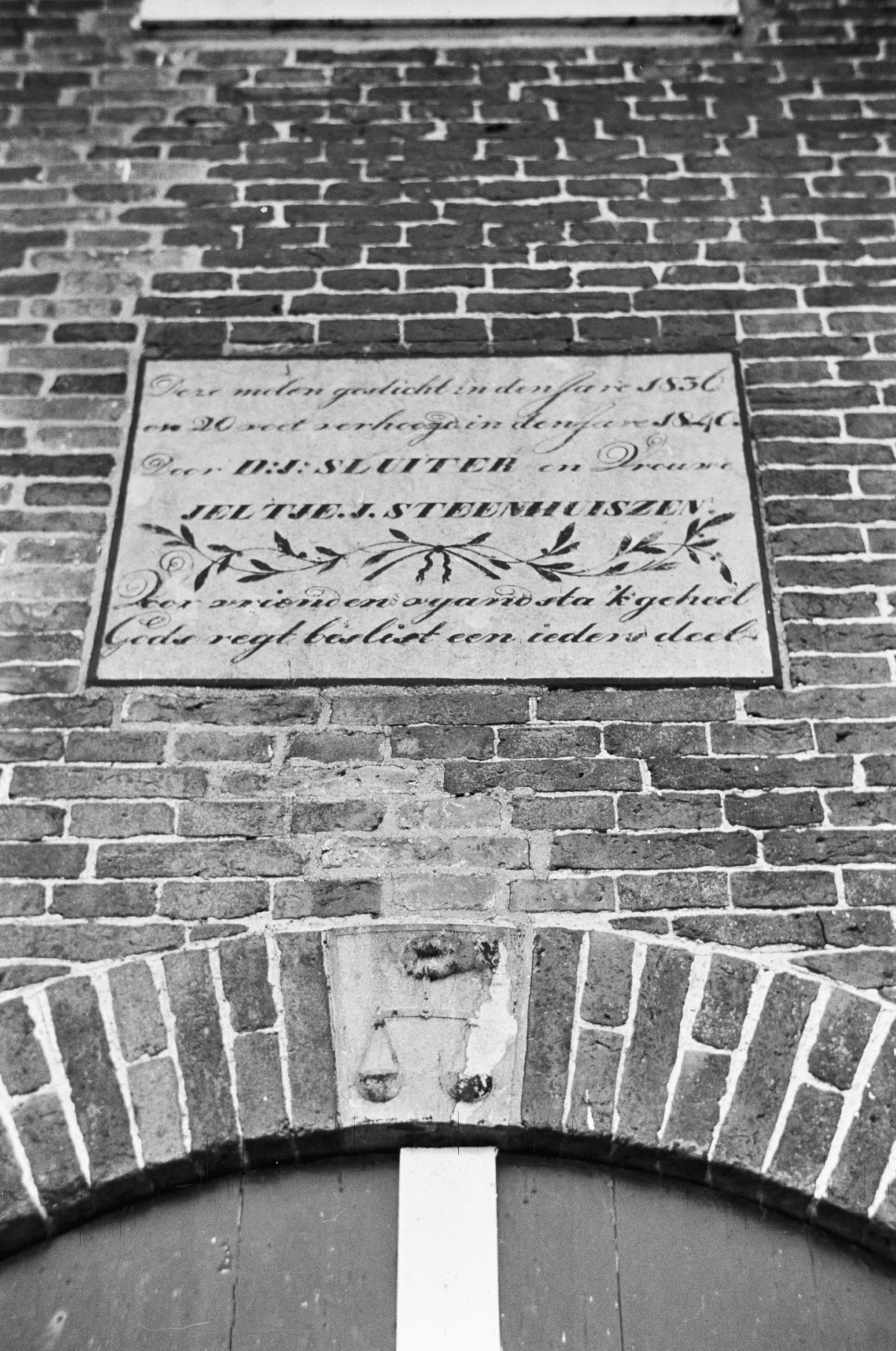 Diversen: Korenmolen "Ropta", stichtingsteen